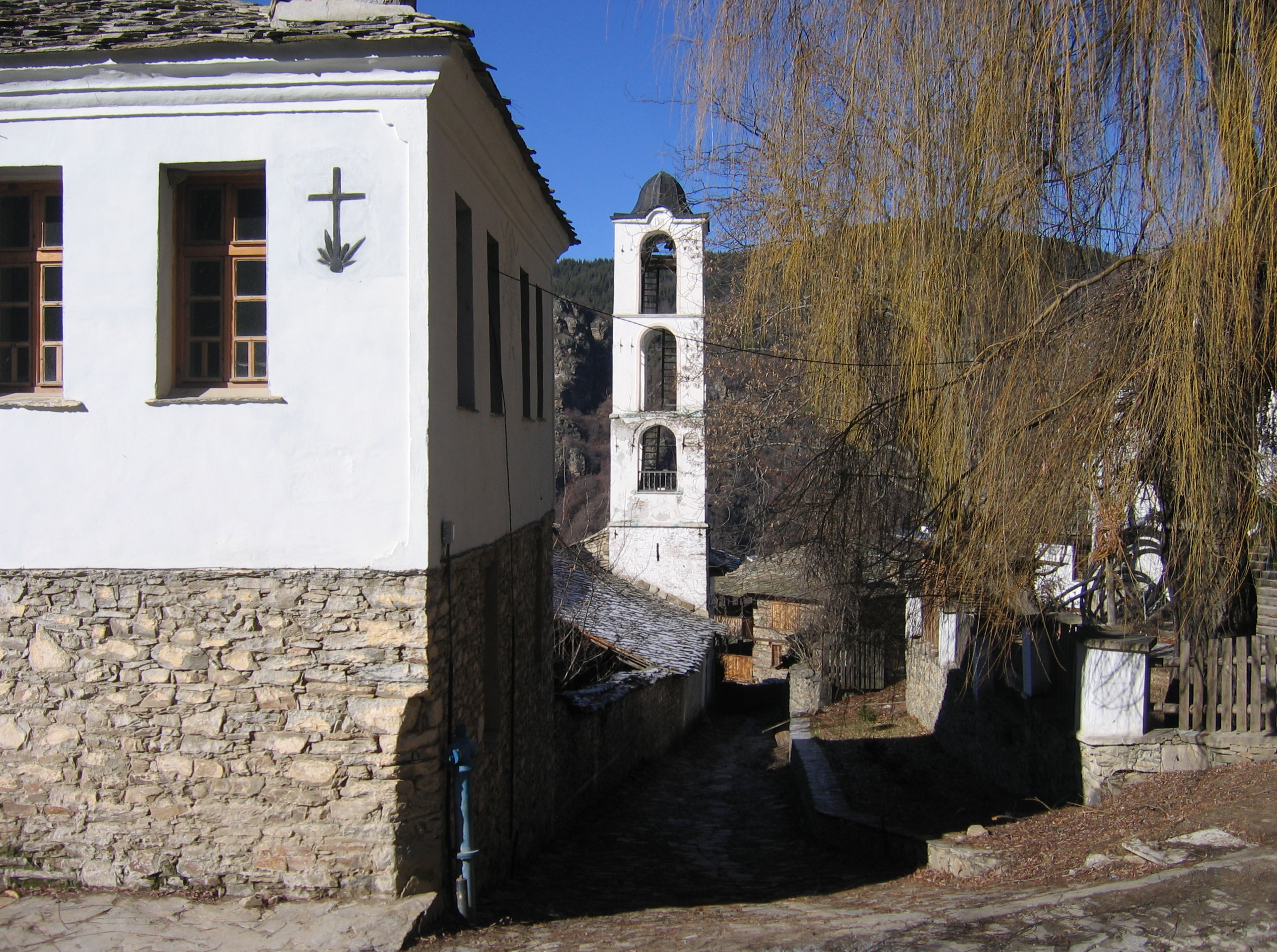 Църква „Св. Никола“, Ковачевица